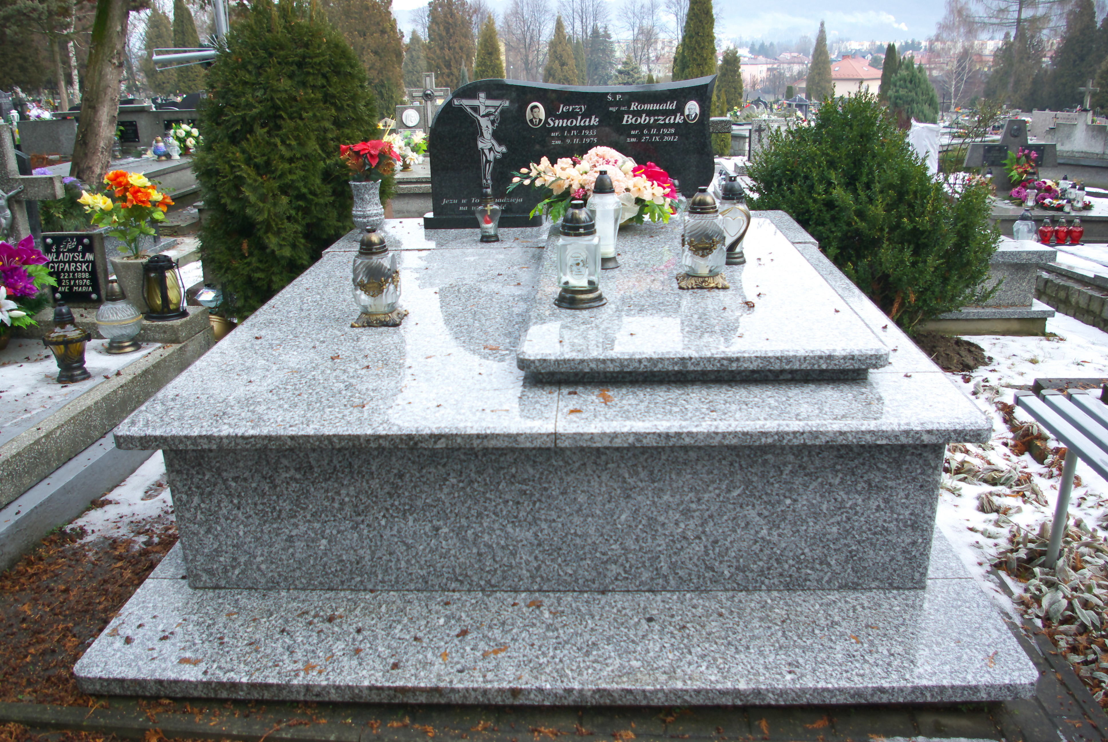 Nagrobek Romualda Bobrzaka i Jerzego Smolaka na Cmentarzu Centralnym w Sanoku.